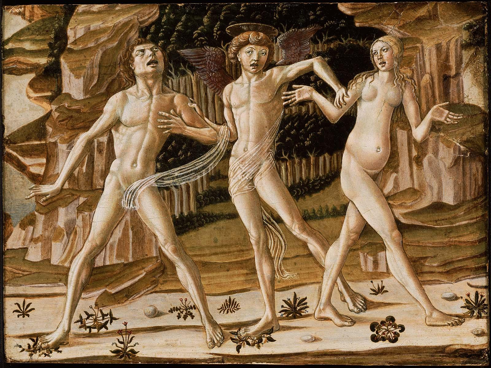 Expulsion_from_paradise_1470._Бостон_МИИ.jpg